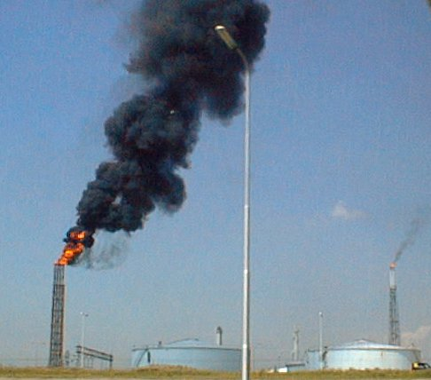 Donderdag 14 juli 2005 omstreeks 11.00 uur maakte een stroomstoring het 'gecontroleerd stilleggen' van alle fabrieken op de Vondelingenplaat noodzakelijk. Het affakkelen van overtollige koolwaterstoffen ging daarbij gepaard met veel rookontwikkeling, vanwege onvoldoende beschikbaarheid van stoom. Stankoverlast in Rotterdam was het gevolg. (Eigen foto gemaakt rond 18:00 dezelfde dag)